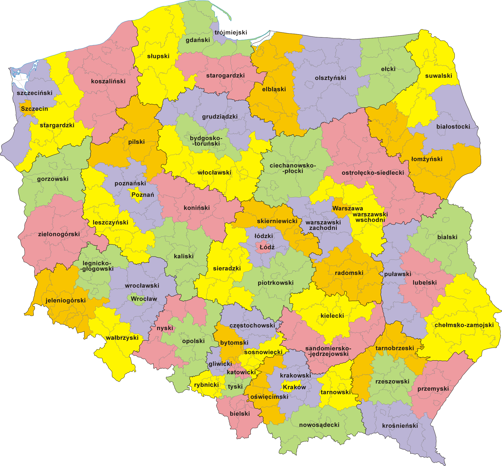 Polska – jednostki NUTS 3 oraz NTS 3 (podregiony) wg podziału obowiązującego od 1 stycznia 2008 roku do 31 grudnia 2014 roku